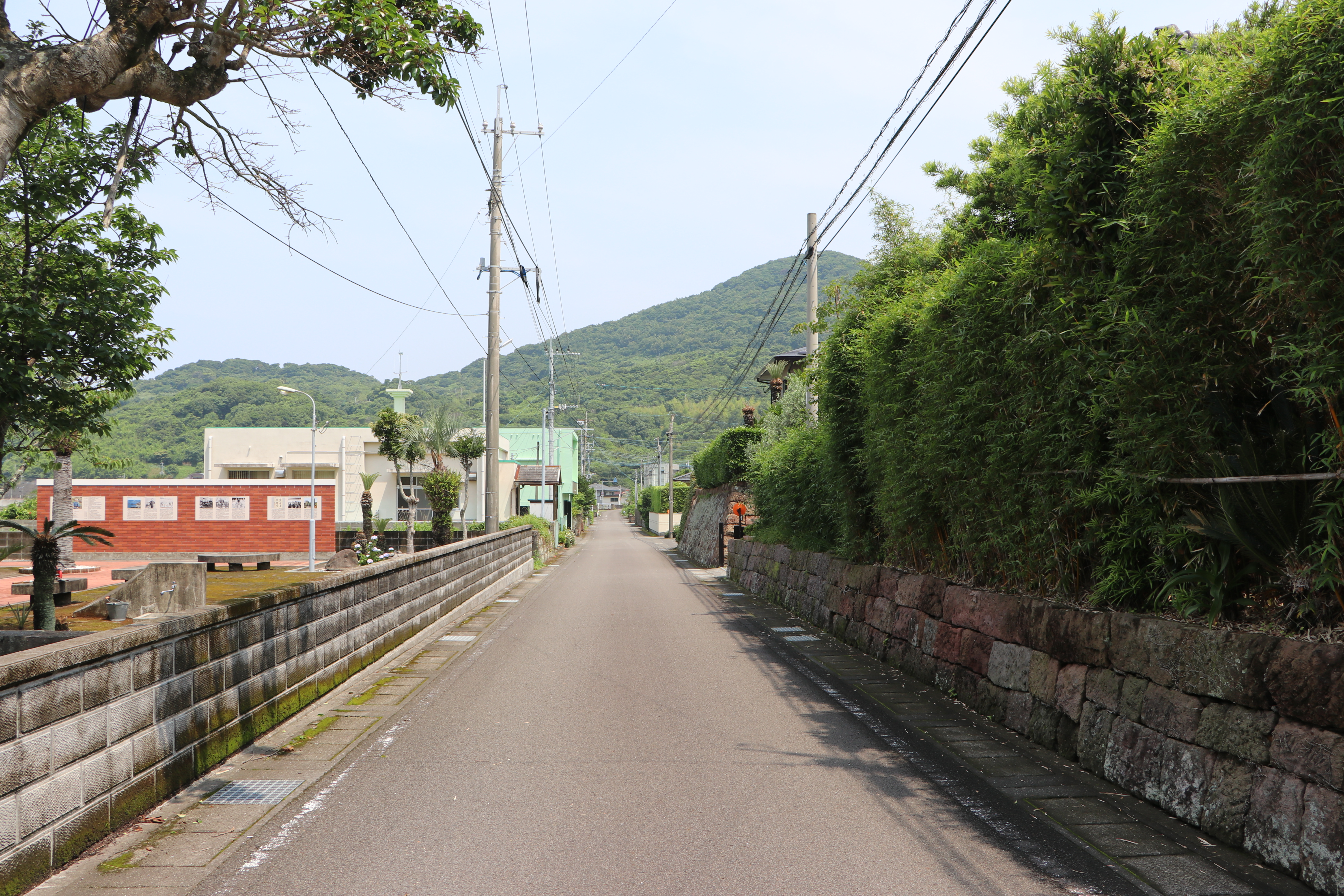 坊津町久志の久志麓の街並み。 Canon EOS 80D